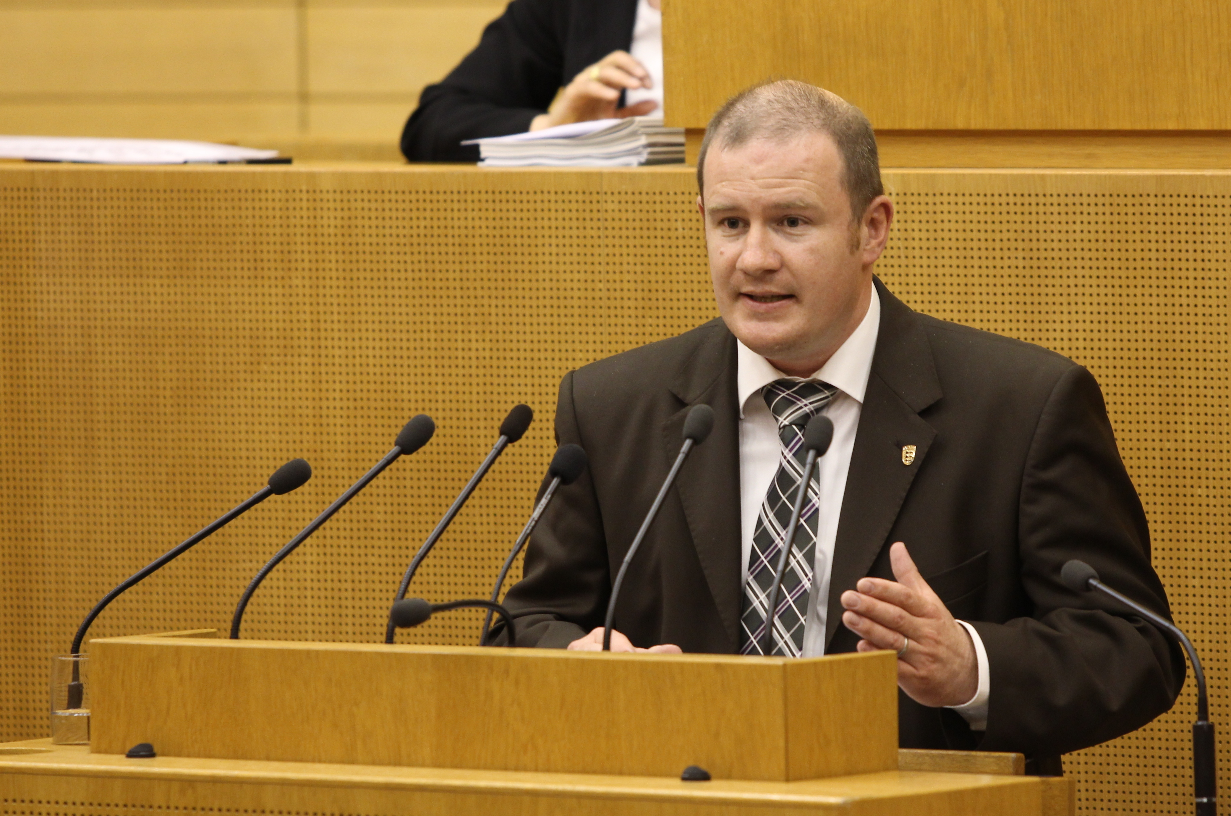 Andreas Glück im Plenarsaal des Landtages von Baden-Württemberg. Wikipedia im Landtag – Baden-Württemberg 15.–16. Mai 2013 in Stuttgart Fragen zur Nachnutzung Wenn Sie Fragen zur Nachnutzung dieses Bildes haben, können Sie sich jederzeit gern an wenden Personality rights warningAlthough this work is freely licensed or in the public domain, the person(s) shown may have rights that legally restrict certain re-uses unless those depicted consent to such uses. In these cases, a model release or other evidence of consent could protect you from infringement claims.